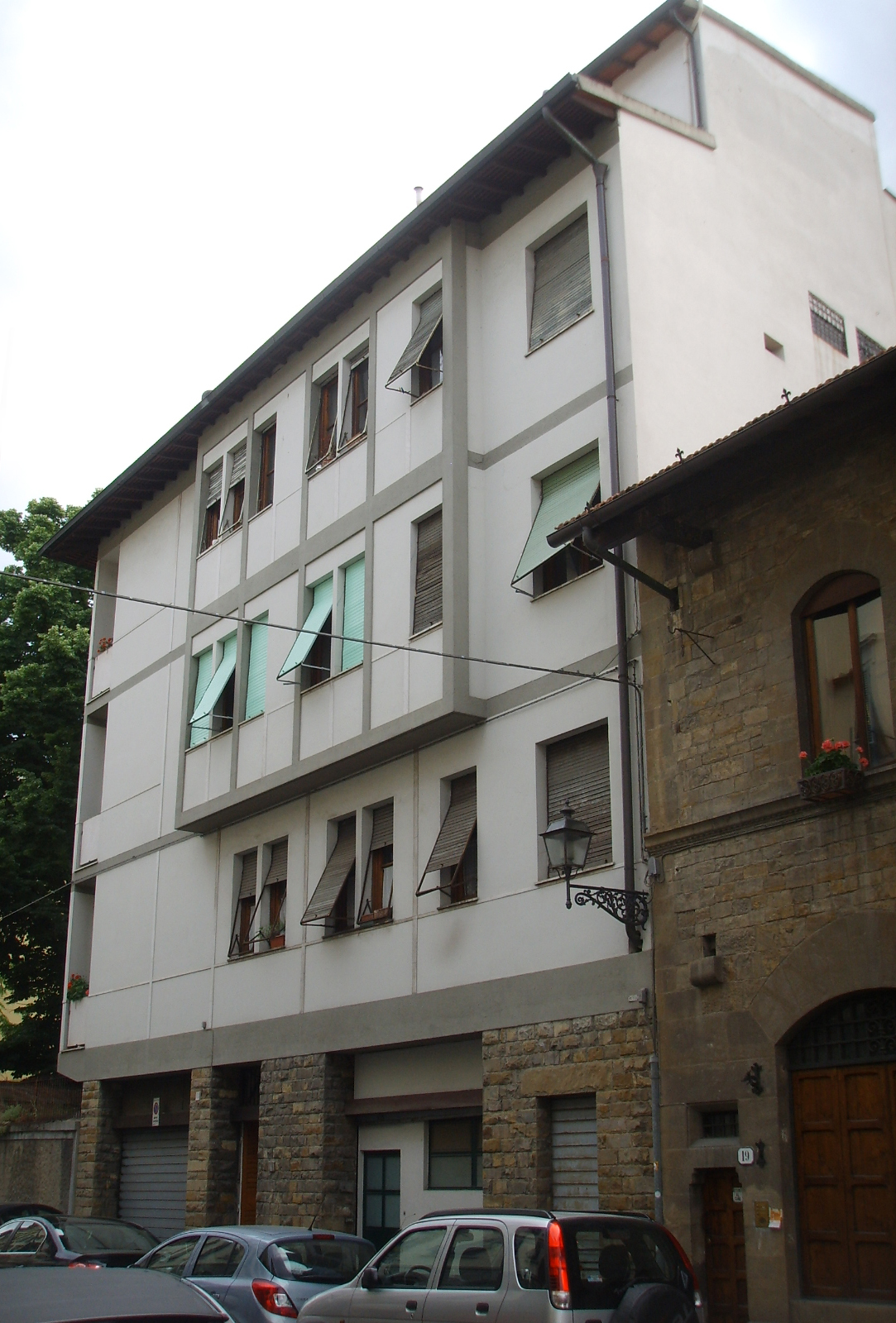 Casa di via montebello